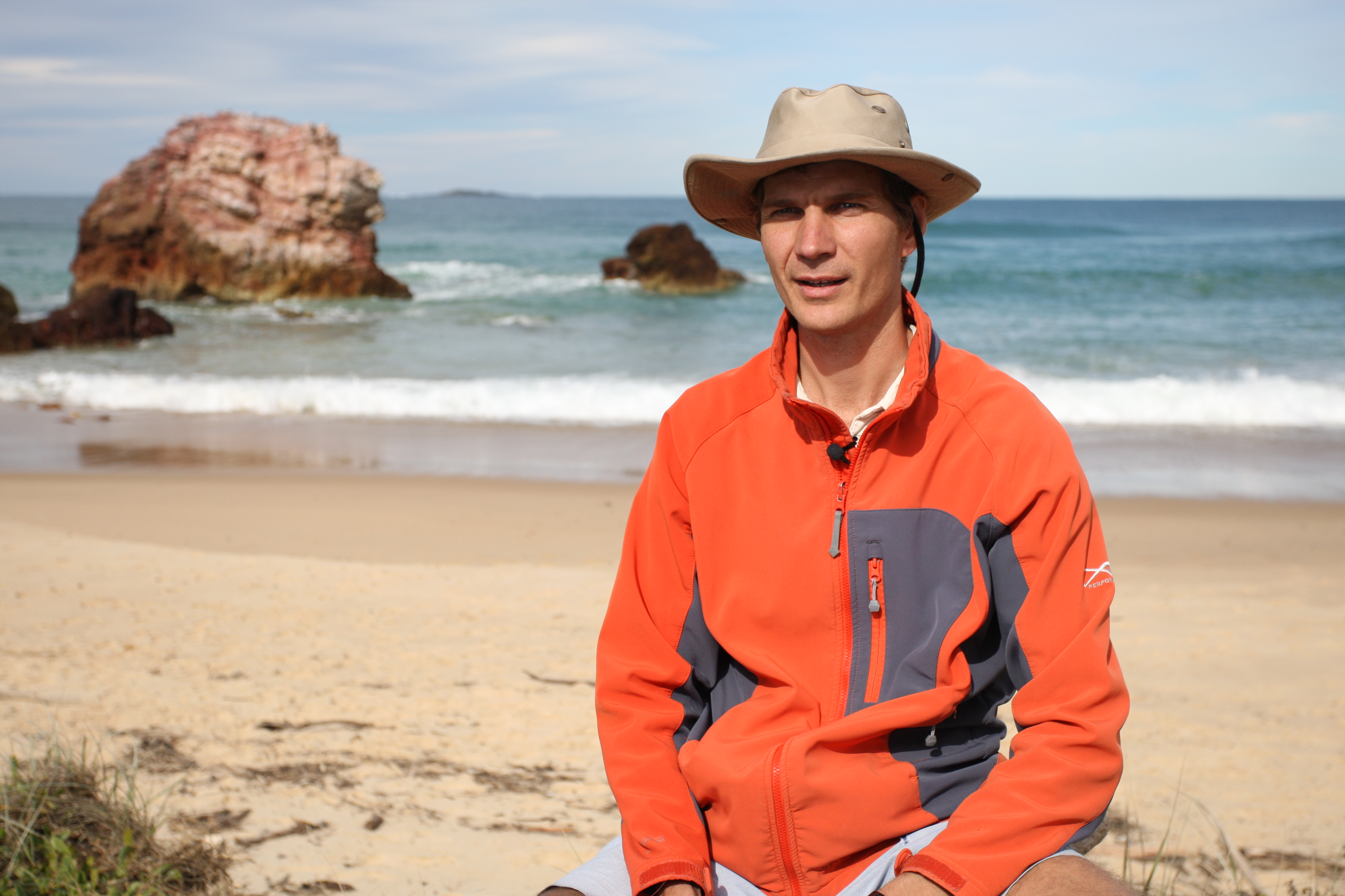 Jonne Kotta